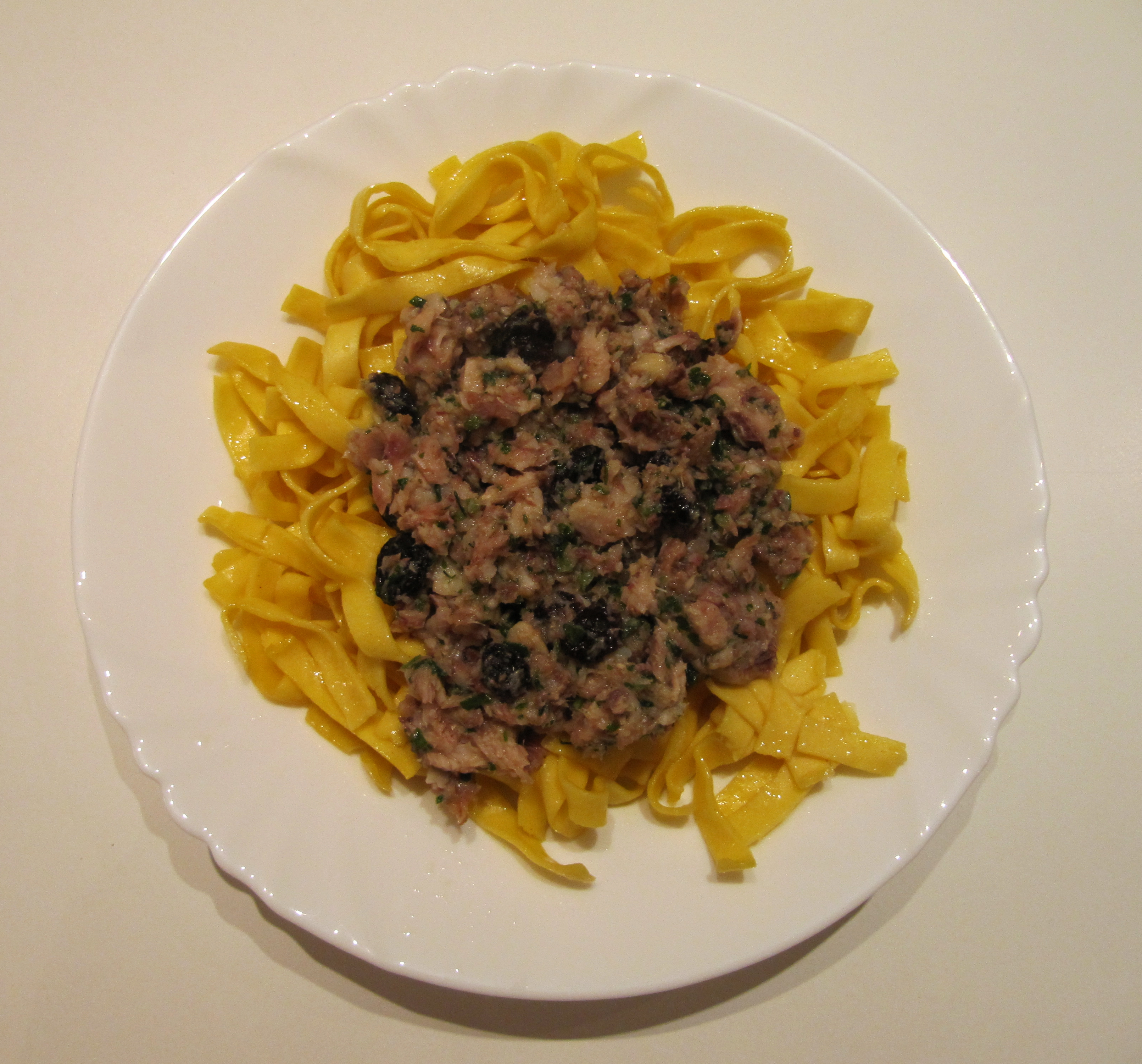 Pasta con le sarde